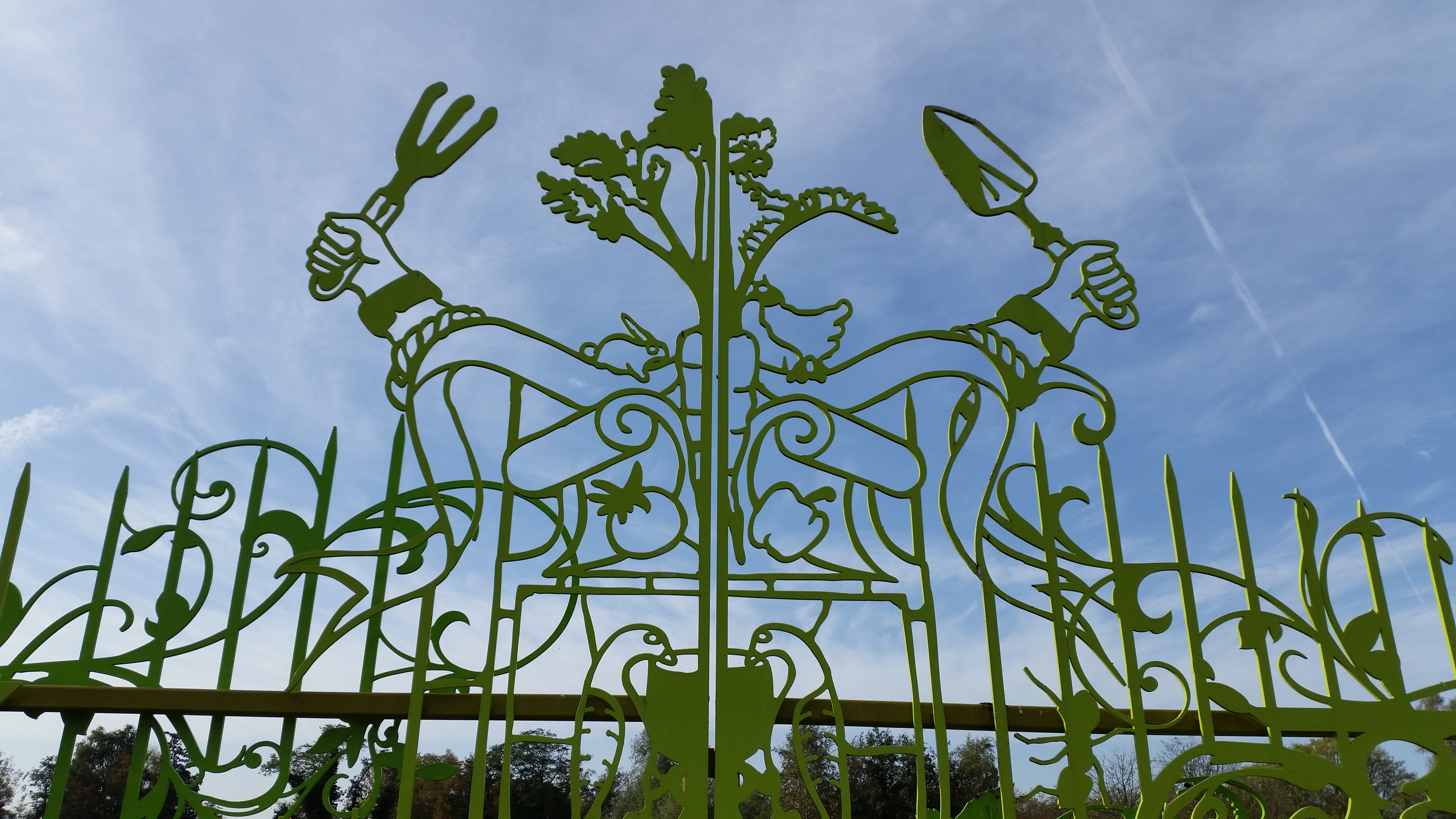 Toegangspoort Aemstel Schooltuinen